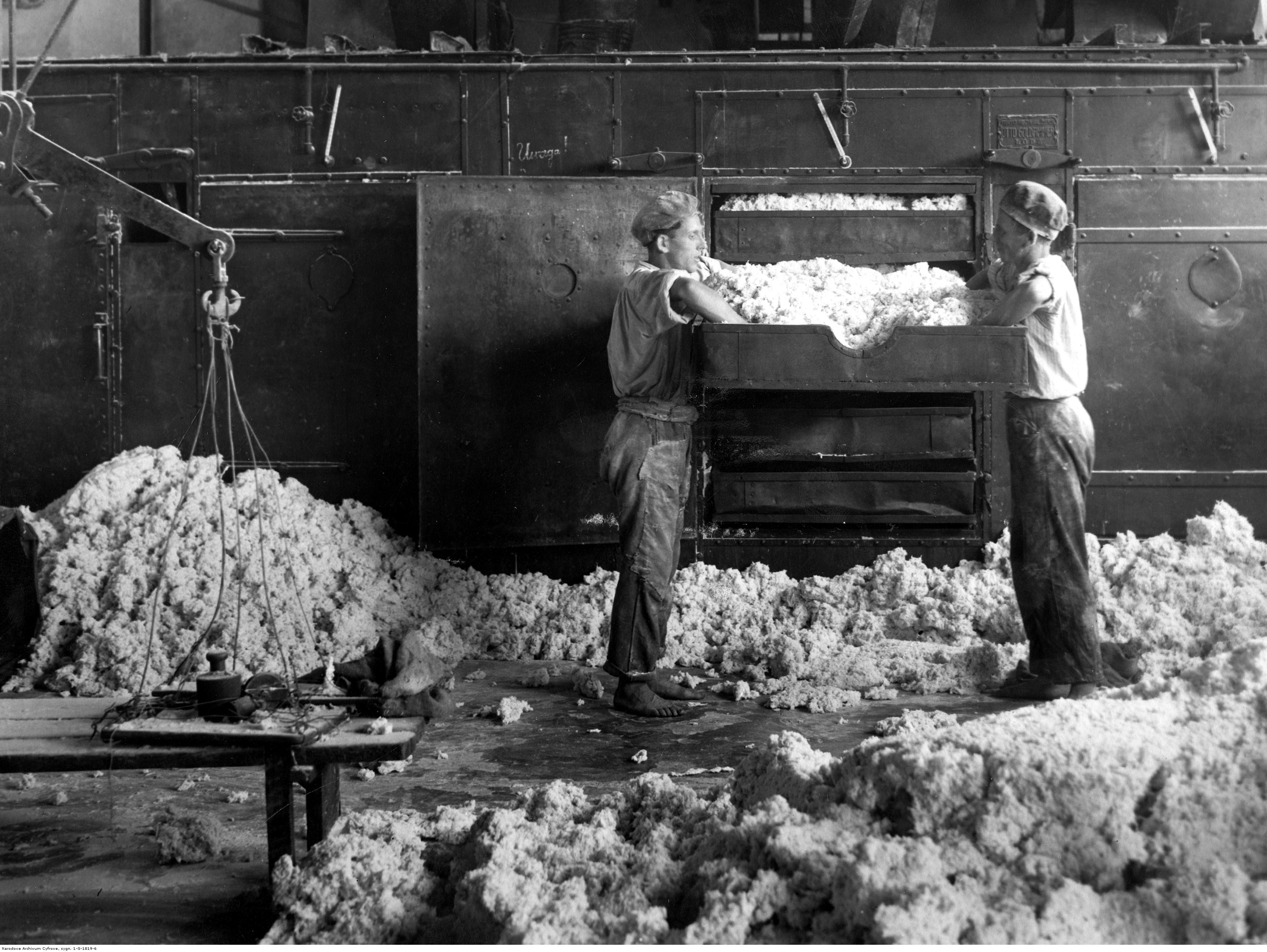 Fabryka sztucznego jedwabiu w Tomaszowie Mazowieckim - suszarnia.